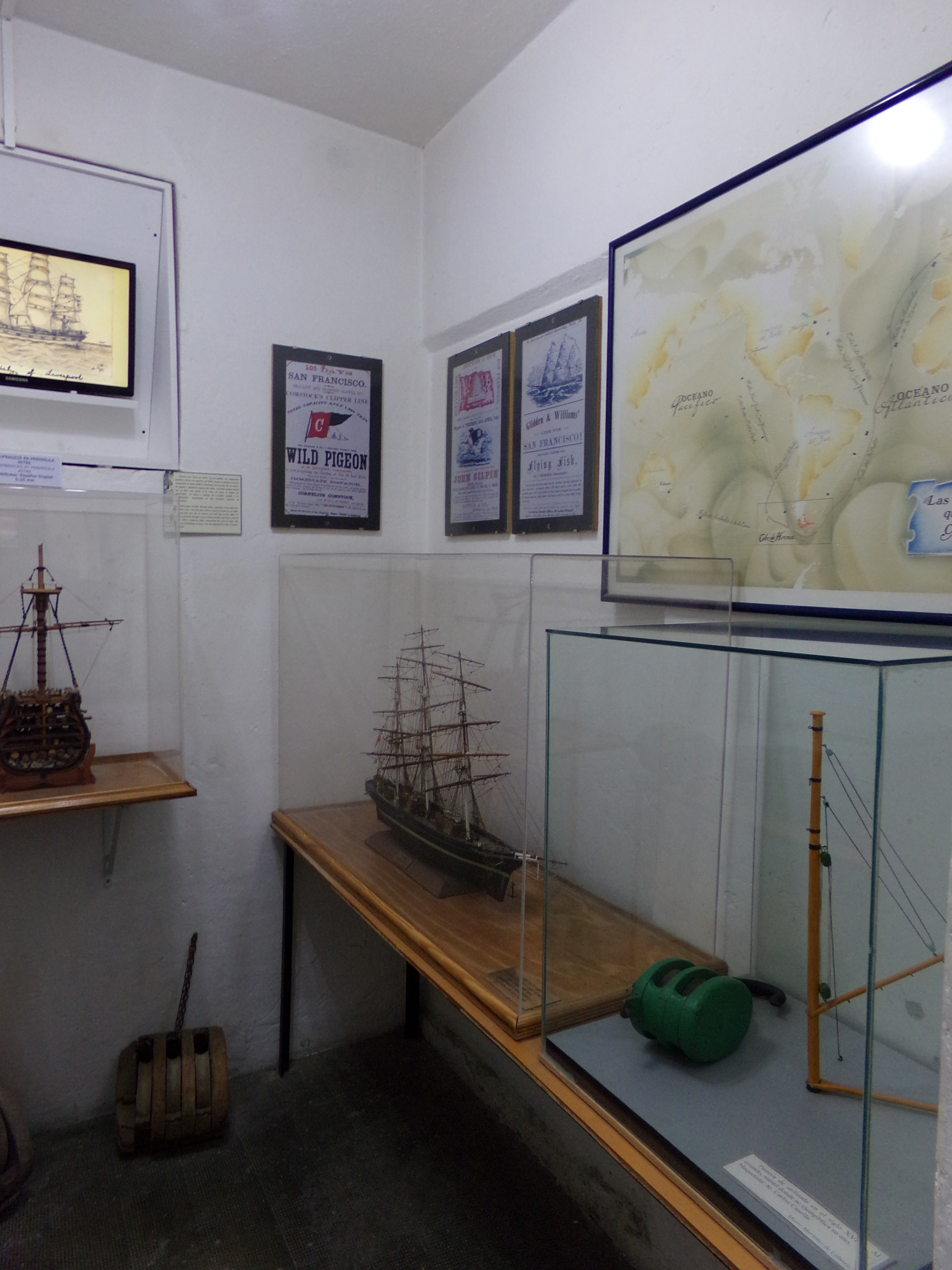 Museo Maritimo y Ex Presidio de Ushuaia, TDF, Arg